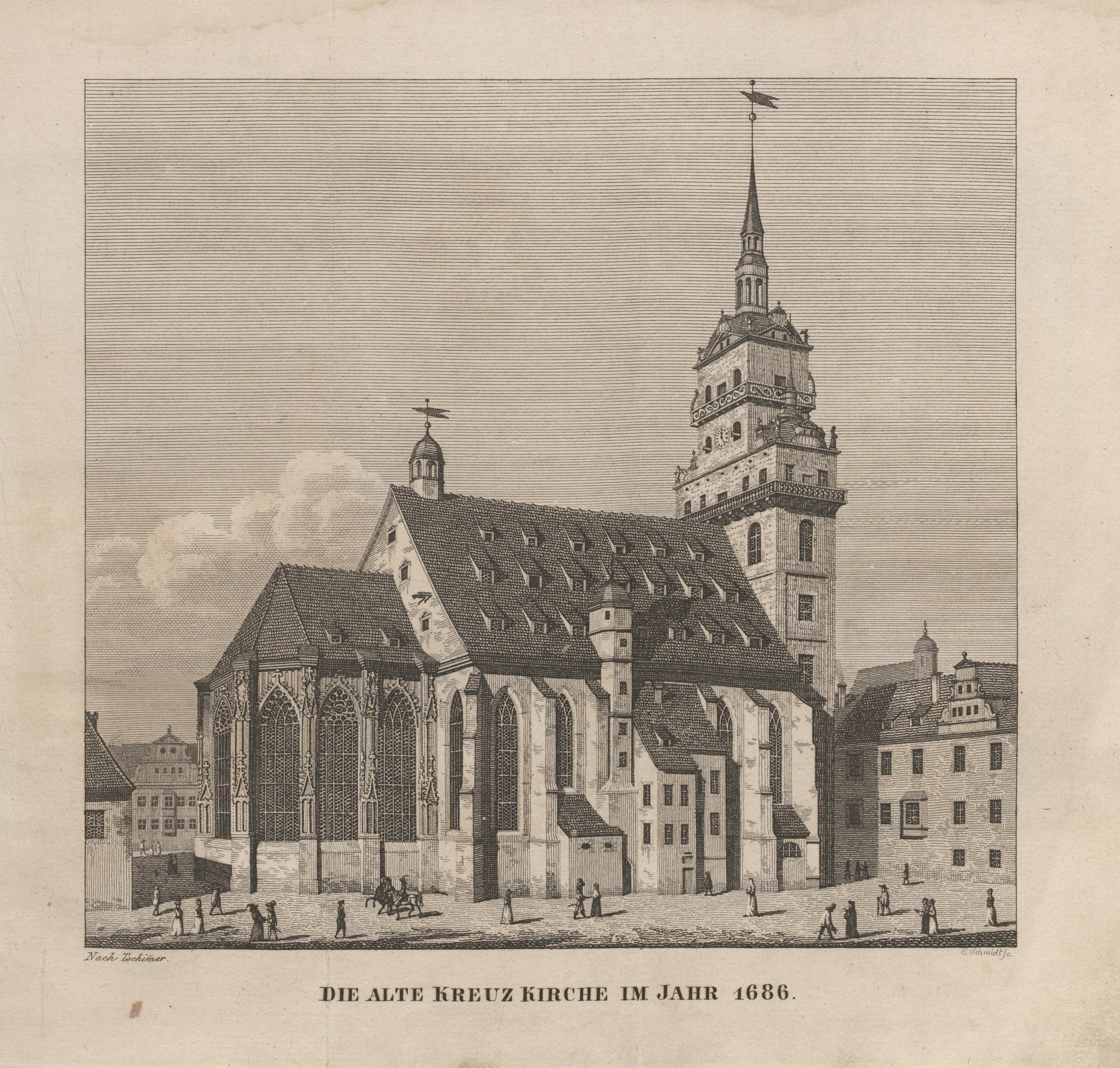 siehe Bildbeschreibung aus: Abbildungen von Dresdens alten und neuen Pracht-Gebäuden, Volks- und Hof-Festen. Untertitel: Kupferheft zur Chronik der Kgl. Sächs. Residenz-Stadt Dresden und des Sammlers für Geschichte und Alterthum, Kunst und Natur im Elbthale. Grimmer, Dresden 1835